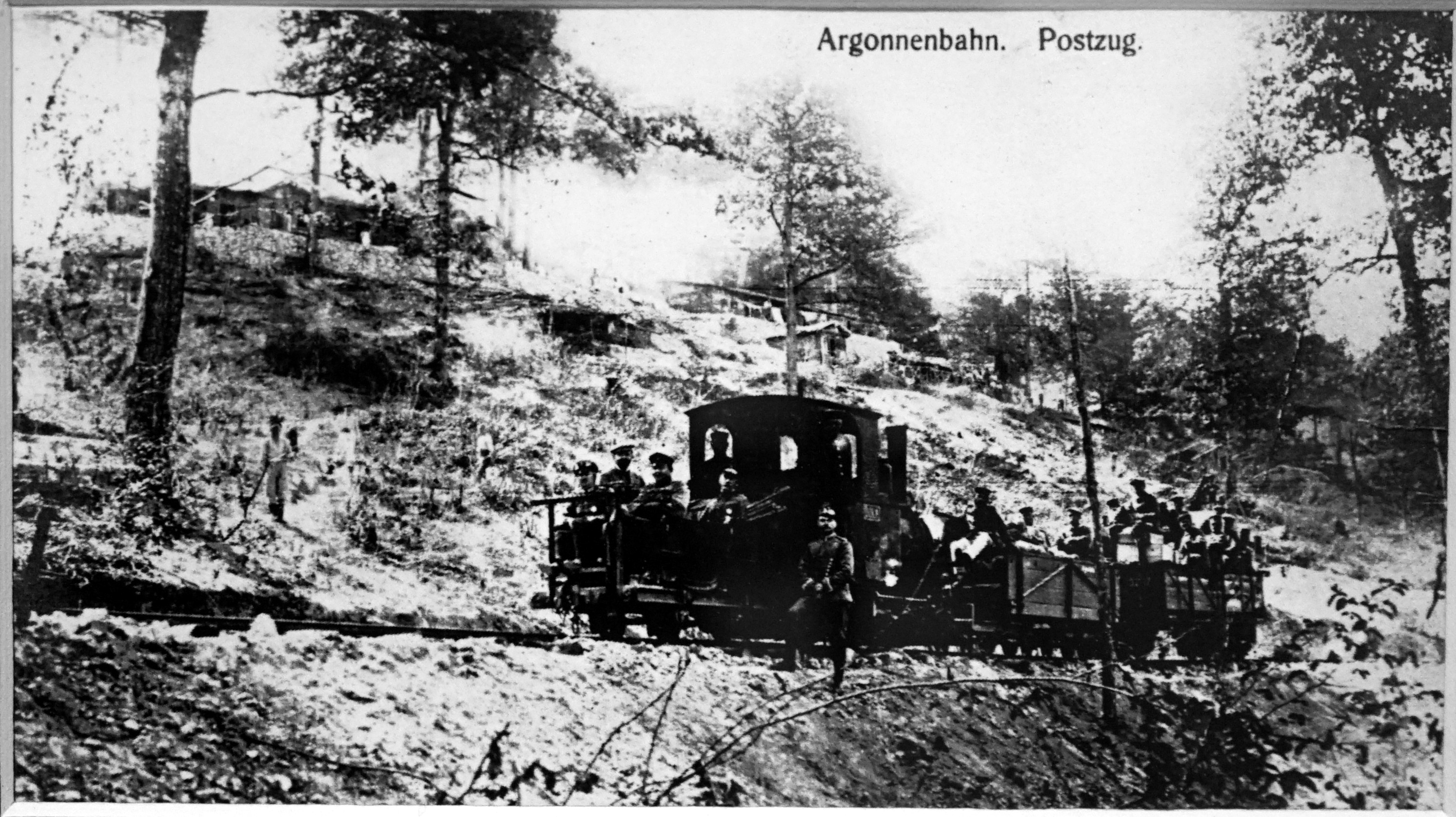 lors d'une exposition temporaire salle N. Appert.